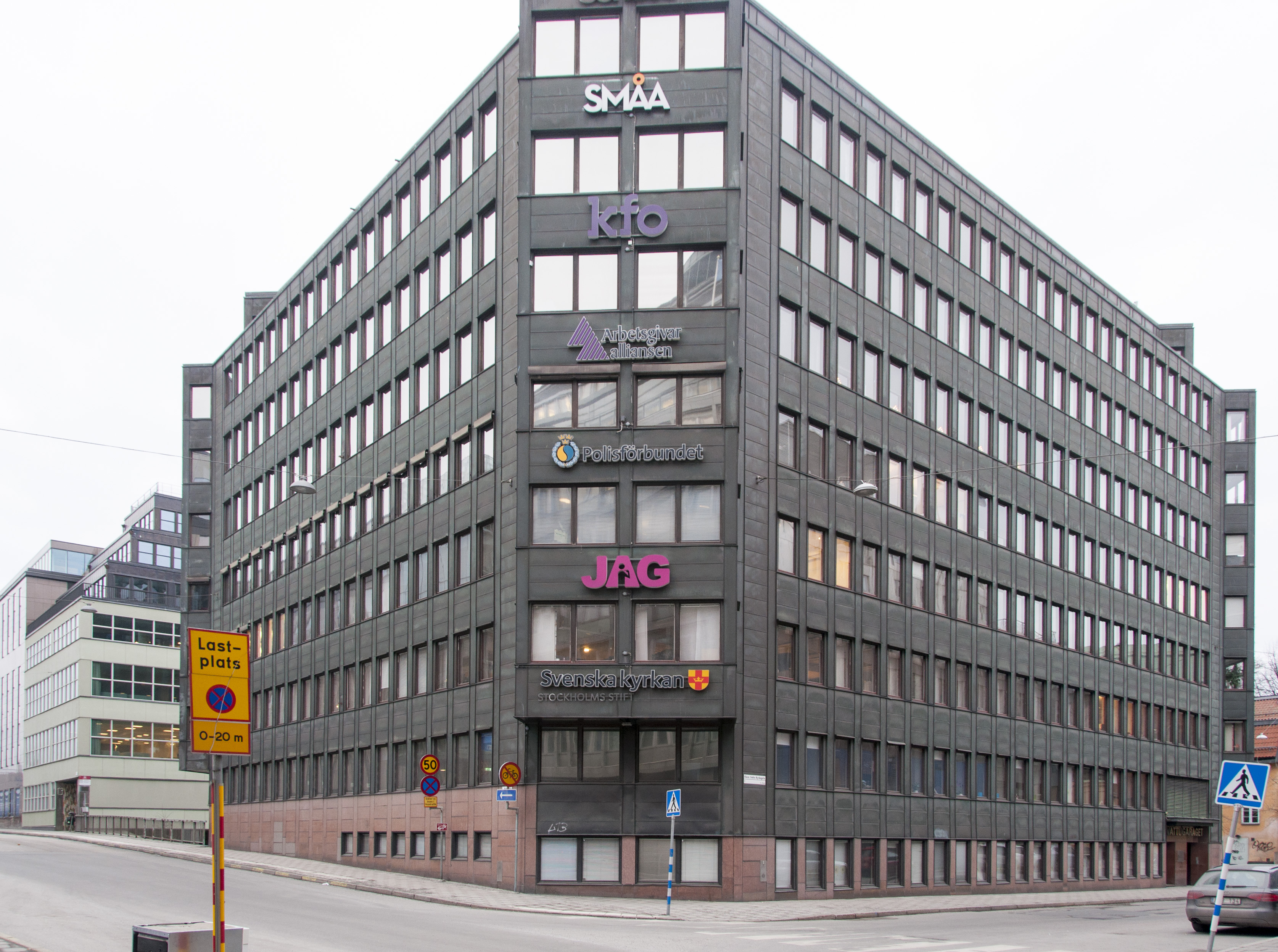 Duvan 6, Klara södra kyrkogata 1, Klara västra kyrkogata 16 Stockholm Nybyggnadsår 1974 - 1981 Klaraduvan AB (Byggherre) Malmquist & Skoog Arkitektkontor (Arkitektkontor)